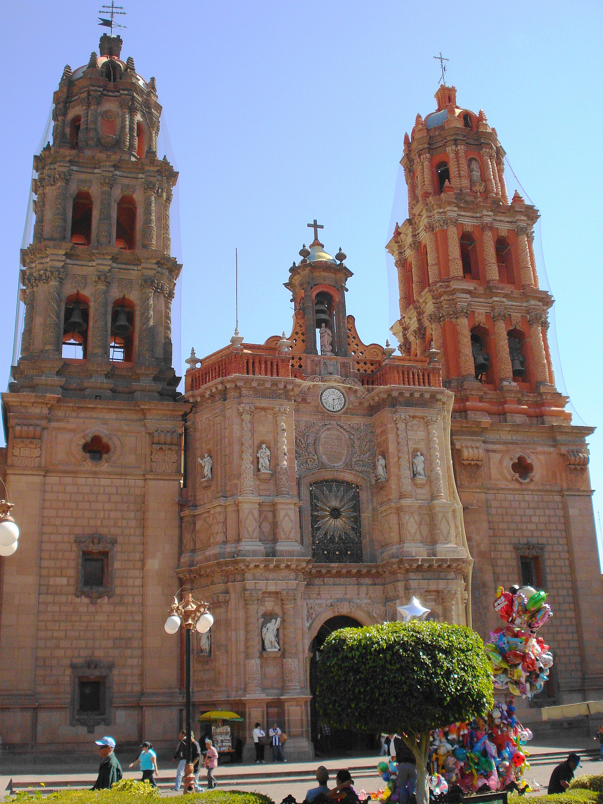 Catedral de la ciudad de San Luis Potosi.